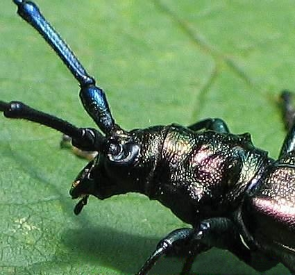 Detail eines Moschusbocks (Aromia moschata) Titel: Detail eines Moschusbocks Auf dem Bildausschnitt ist die Bedornung des Halsschildes und die von den Augen umwachsene kräftige Fühlerbasis zu erkennen. Beides sind typische Merkmale vieler Bockkäferarten.